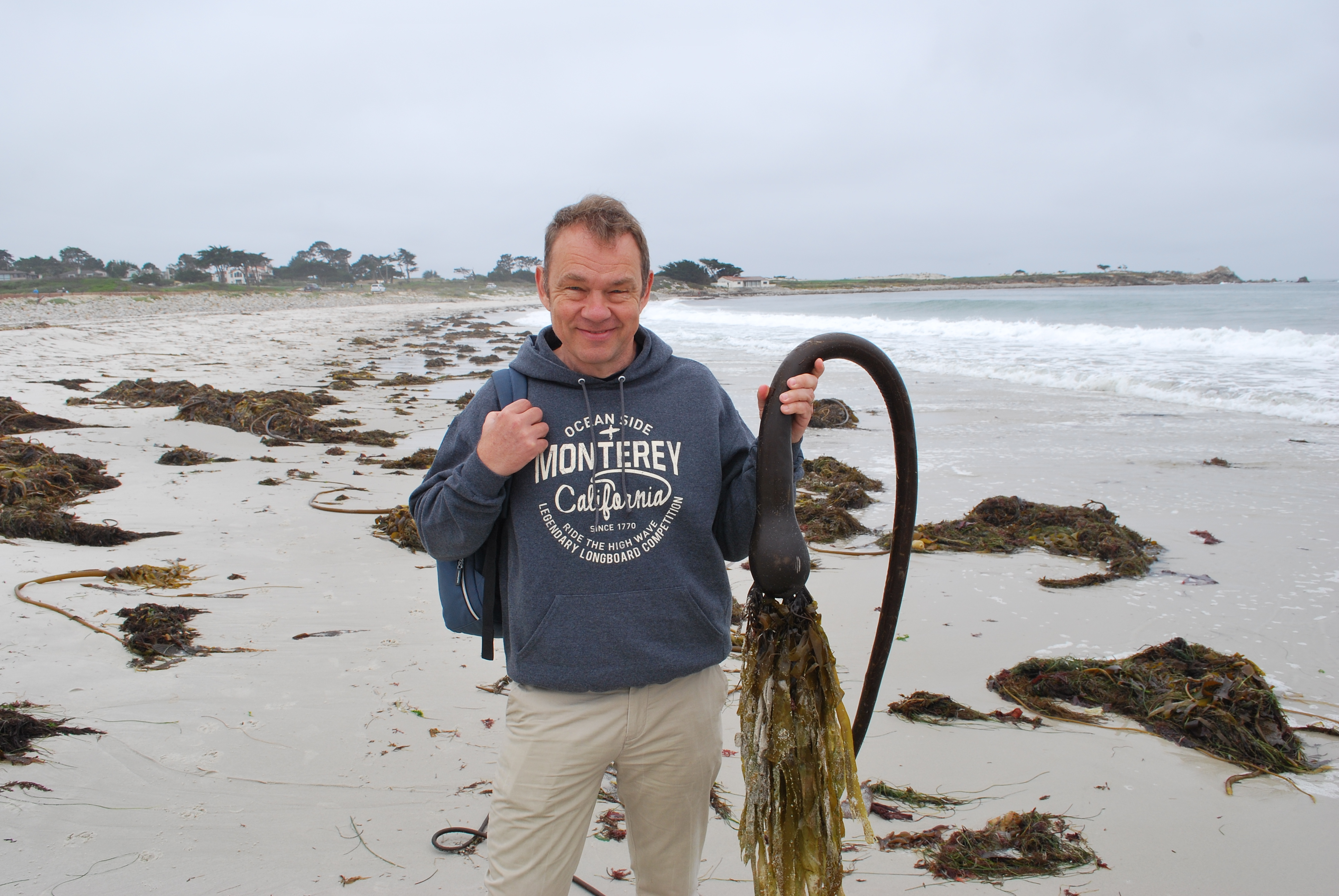 Jan Gyllenbok, expert på historisk metrologi